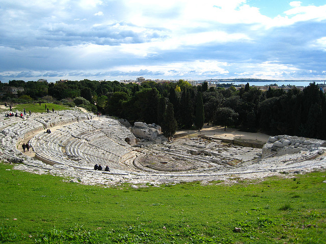 Visuale del Teatro Greco di Siracusa